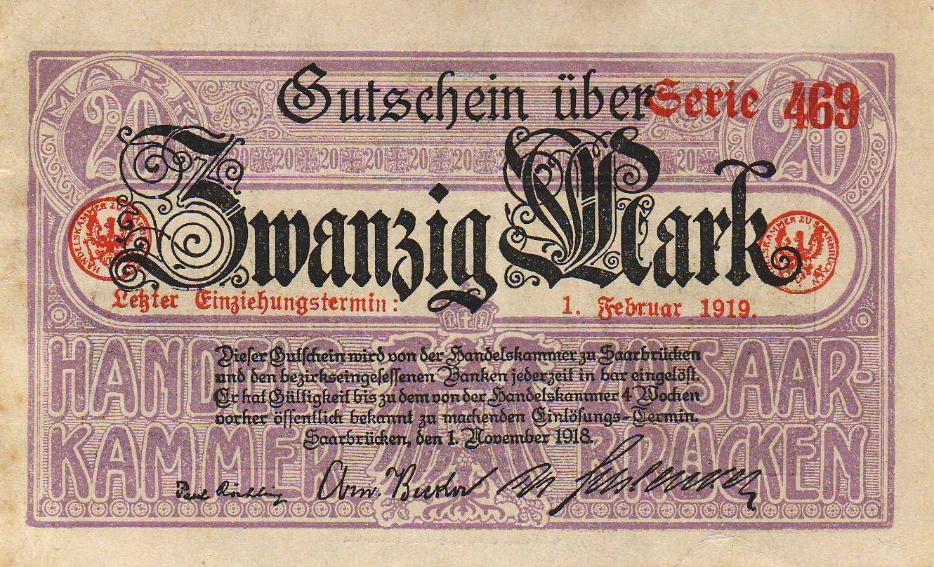 Notgeld der Handelskammer Saarbücken